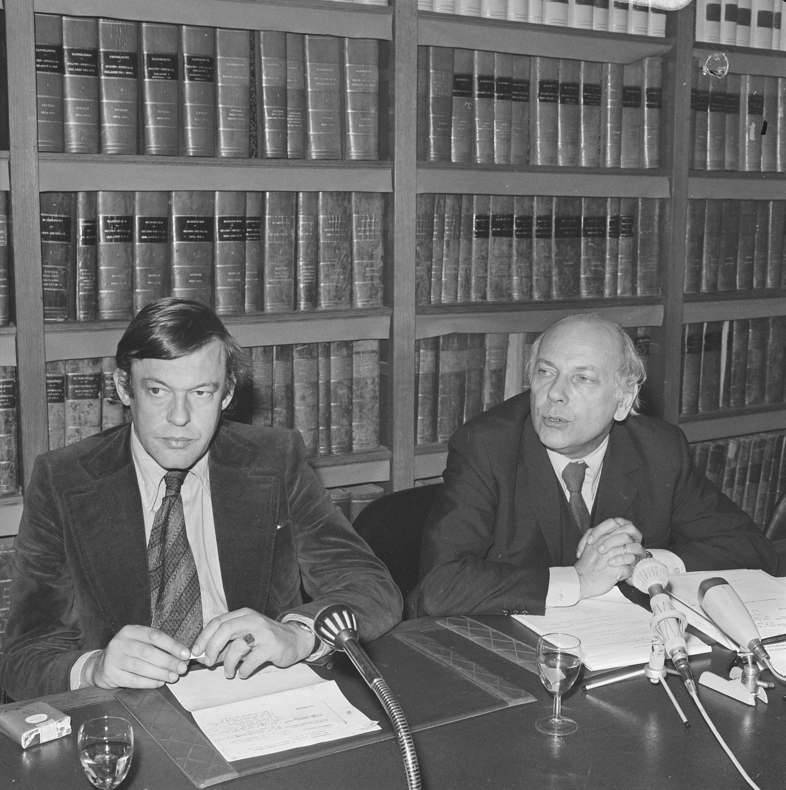 Collectie / Archief : Fotocollectie Anefo Reportage / Serie : [ onbekend ] Beschrijving : Drie progressieve partijen (PvdA, D66, PPR) presenteren schaduwkabinet, mr. H. A. F. M. O. van Mierlo (l) en drs. J. M. den Uyl Datum : 18 november 1972 Locatie : Den Haag Trefwoorden : politici, politiek Persoonsnaam : Mierlo, Hans van, Uyl, Joop den Instellingsnaam : D66, PPR, PvdA Fotograaf : Evers, Joost / Anefo Auteursrechthebbende : Nationaal Archief Materiaalsoort : Negatief (zwart/wit) Nummer archiefinventaris : bekijk toegang 2.24.01.03 Bestanddeelnummer : 926-0343